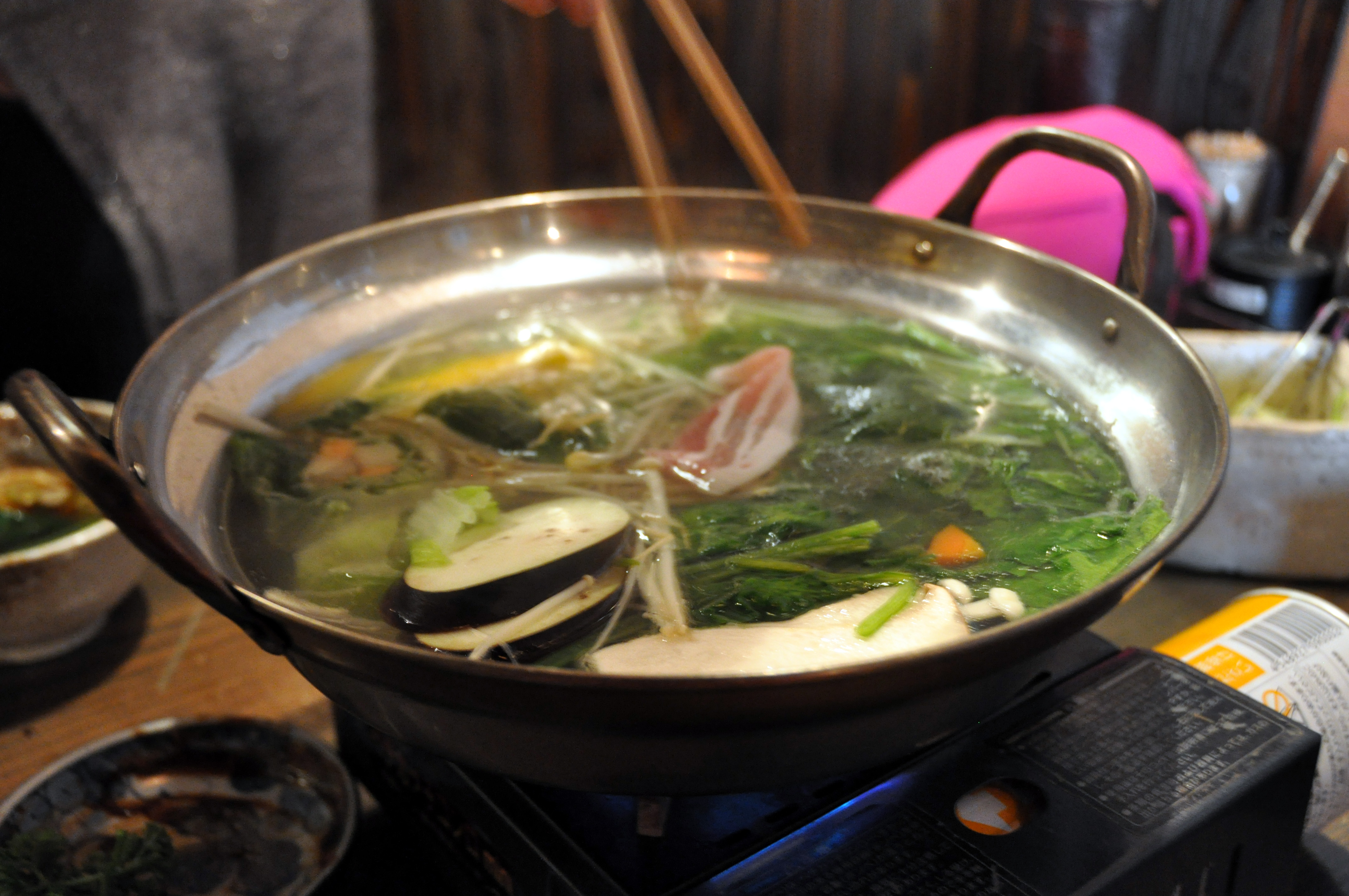 Shabu-shabu